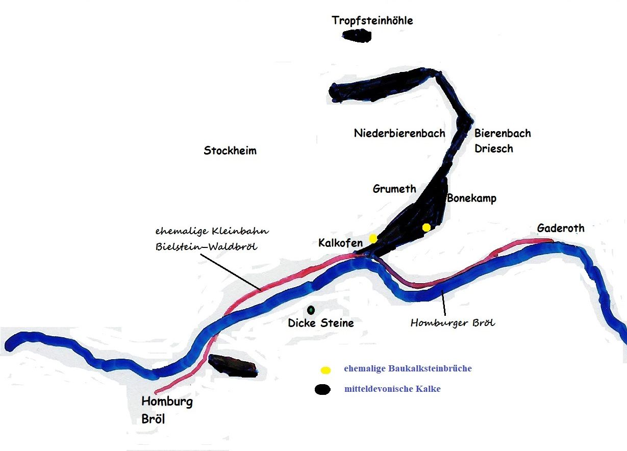 Faustskizze: Lage der Grenzkalke vor allem im Bierenbachtal auf der Grundlage der Geologischen Karte, Blatt Wiehl, Krefeld 1970